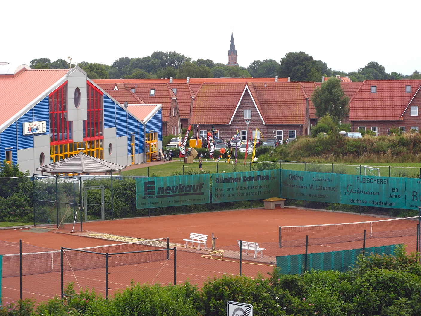 Spielscheune in Burhave (Rückseite) und Sportanlagen